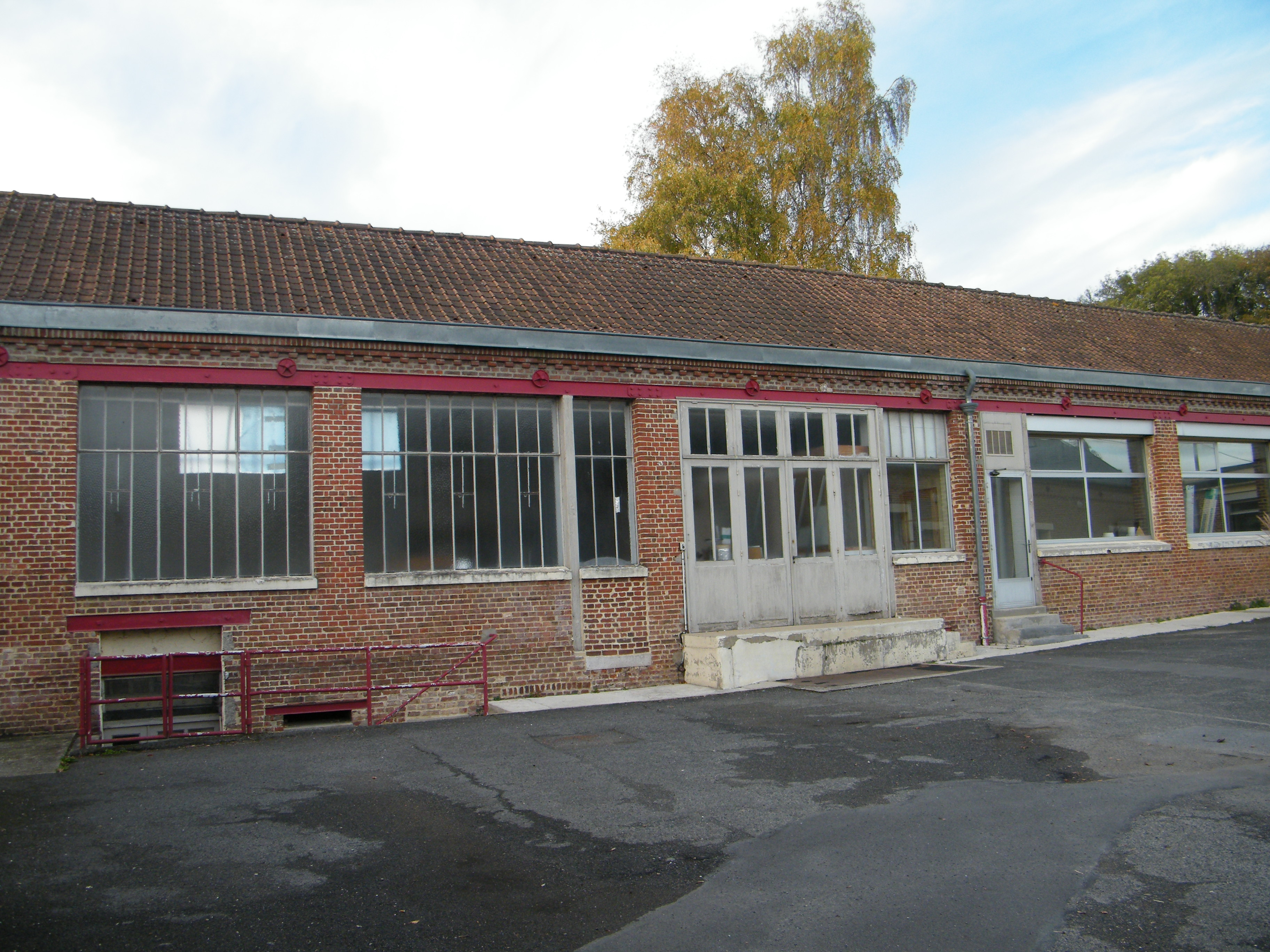 Ailly-le-Haut-Clocher, Somme, ancienne boutonnerie Sabras, ancien siège de la communauté de communes du Haut-Clocher